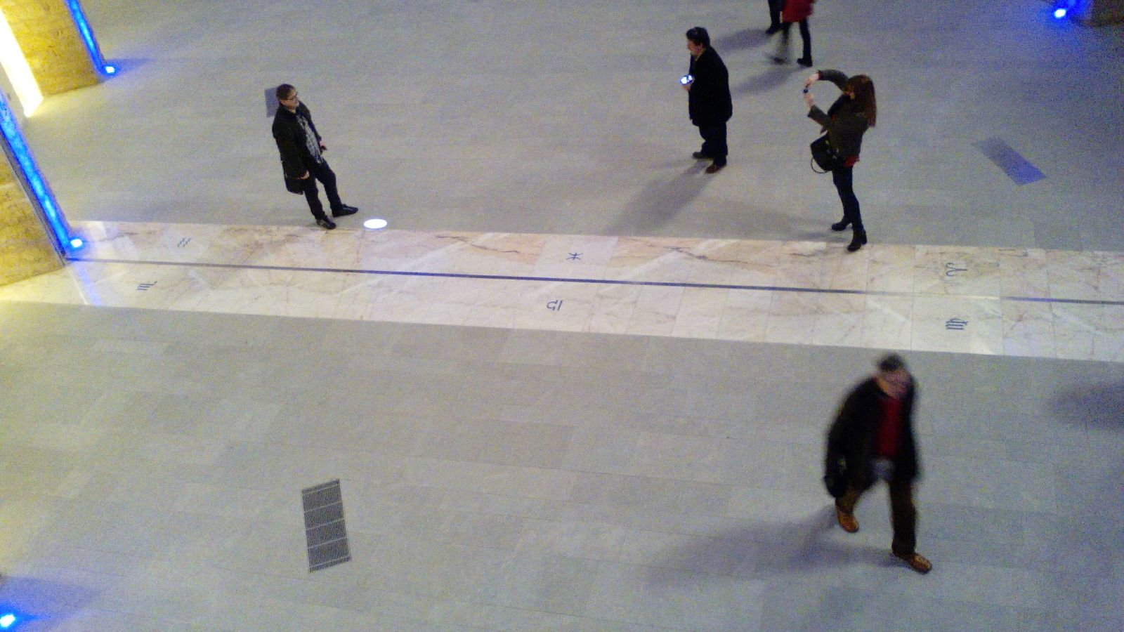 Línea meridiana en la iglesa de Becerril de Campos, Palencia